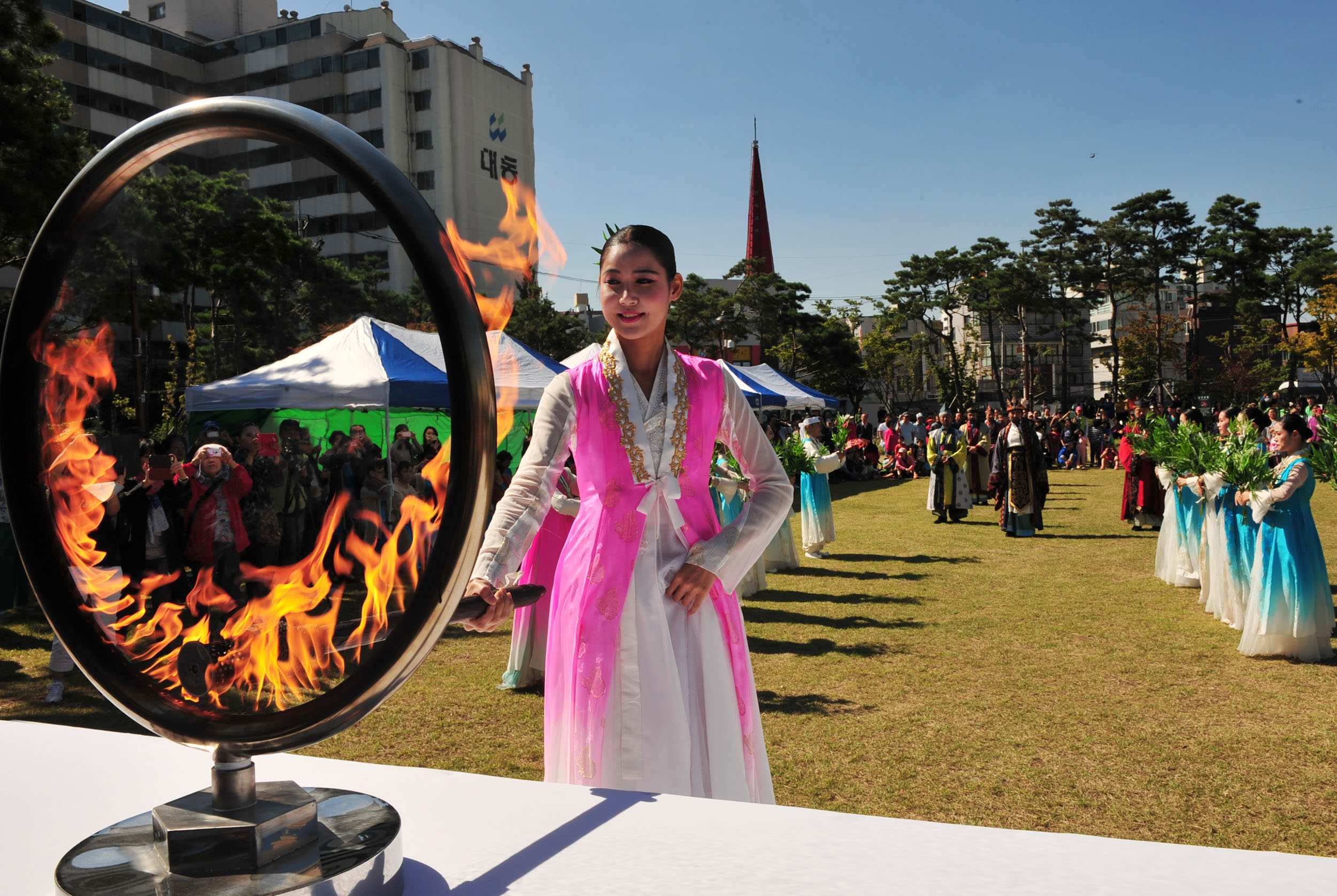 제13회 한성백제문화제 혼불채화식